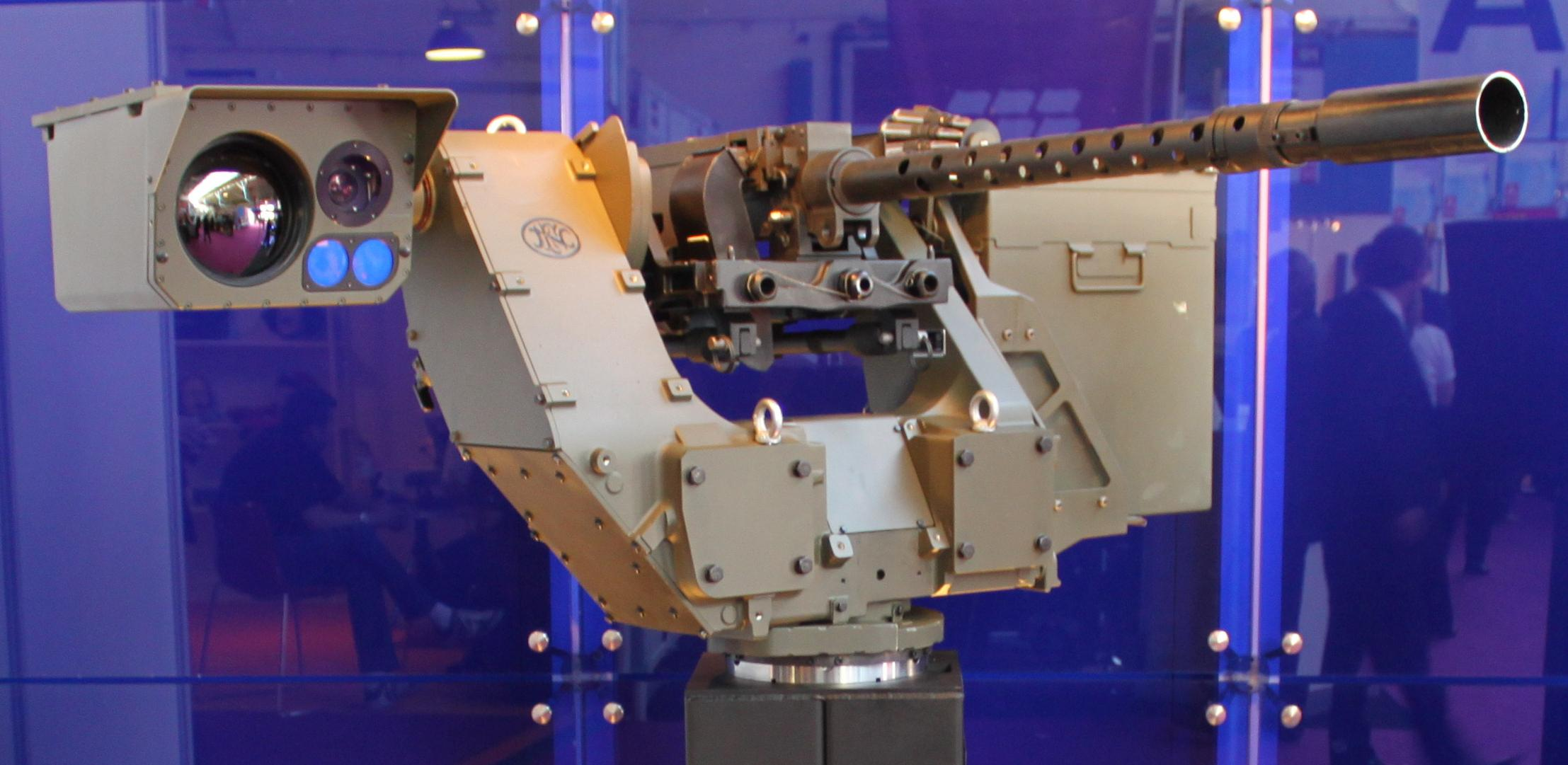 Fernbedienbare Waffenstation deFNder Medium des belgische Herstellers FN Herstal mit Maschinenkanone M3